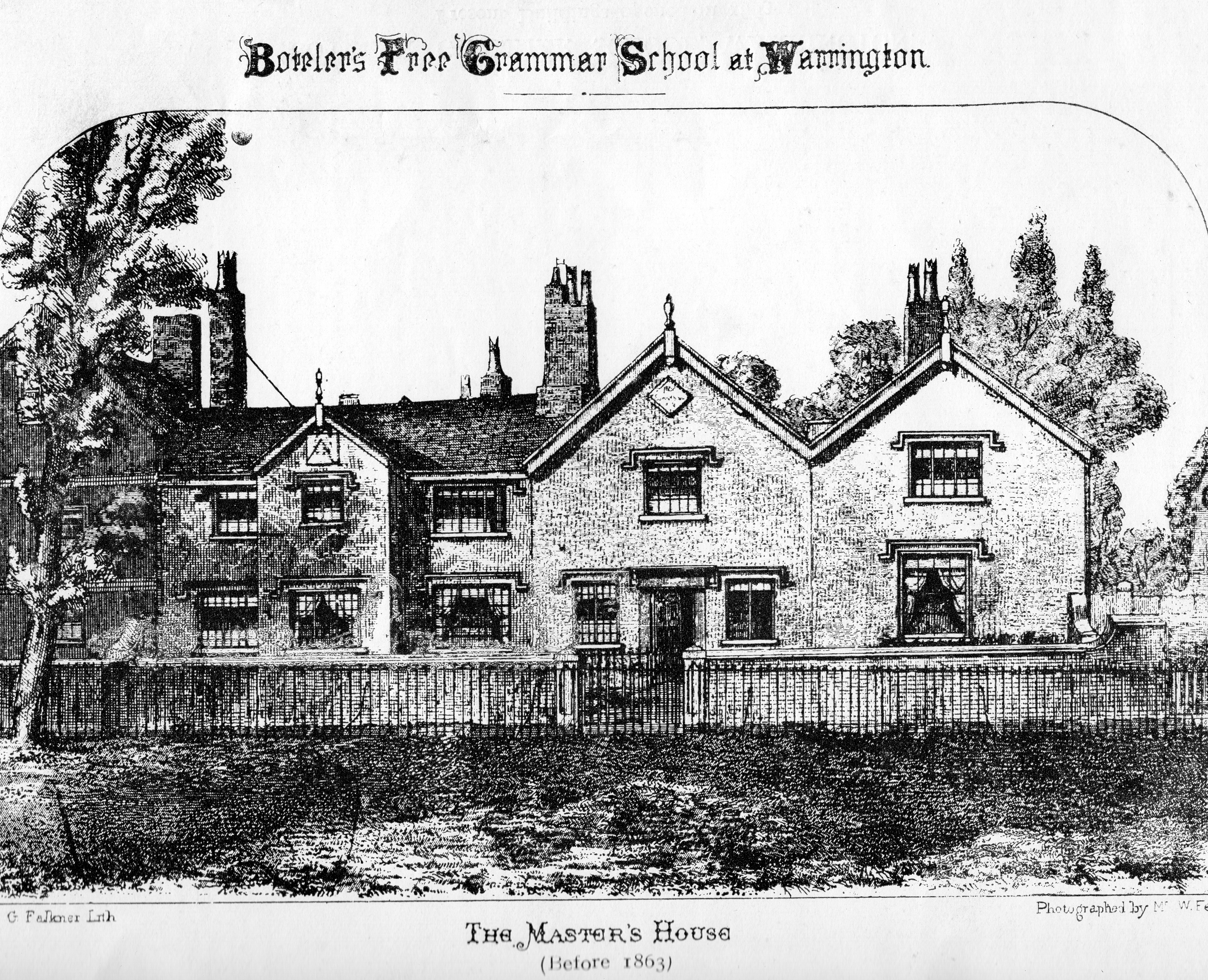 The Masters House